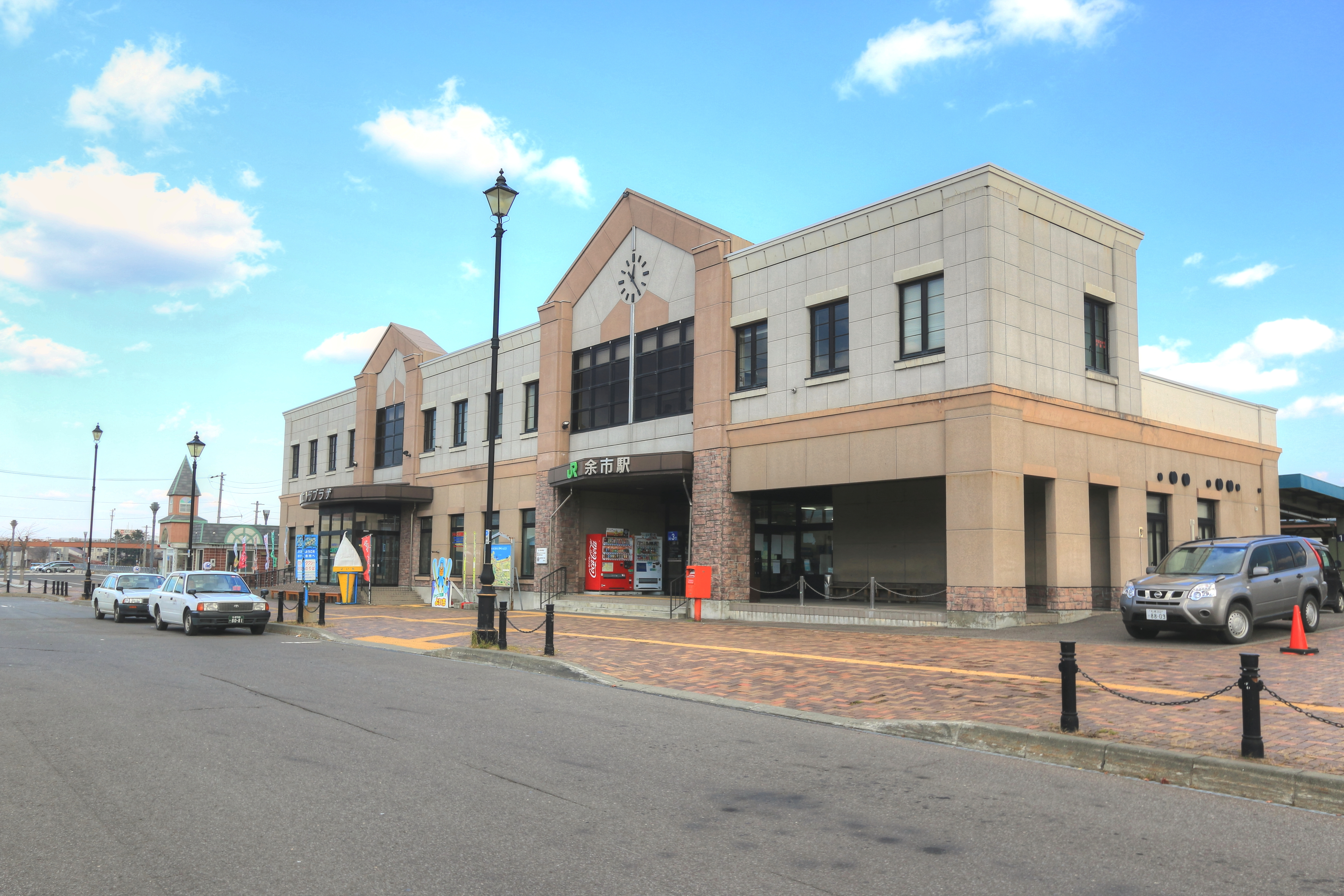 余市駅